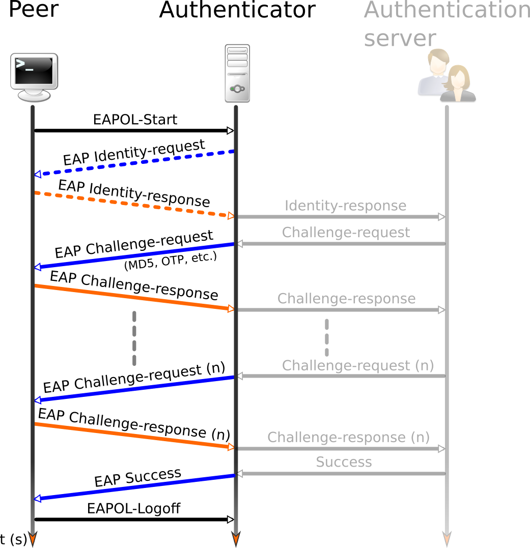 Schéma d'authentification EAP over LAN